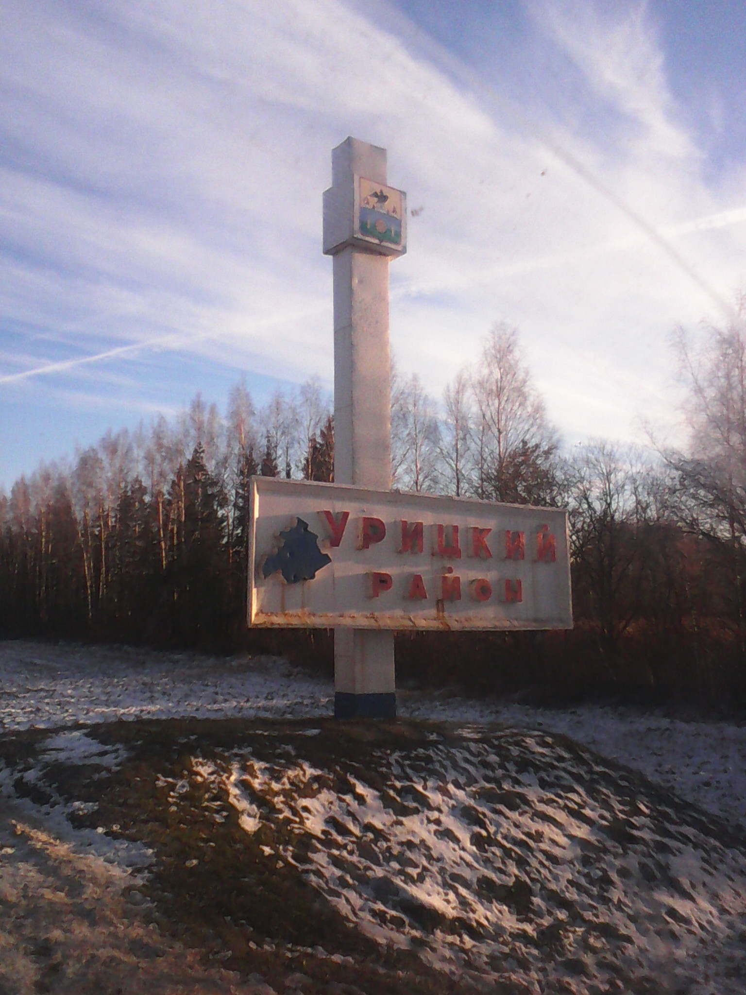 стела на трассе А141